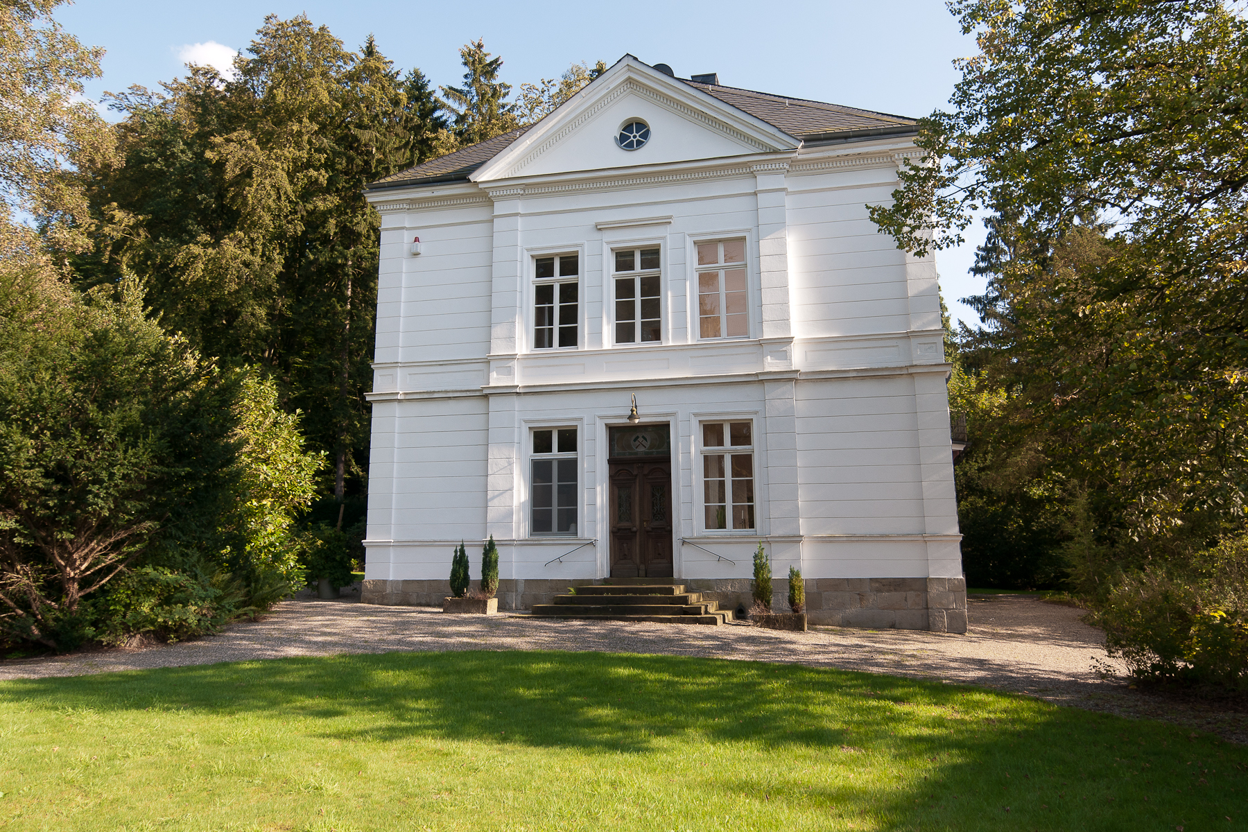 Rösrath, Denkmalnummer 11, Hauptstrasse 316 (Villa Longree)